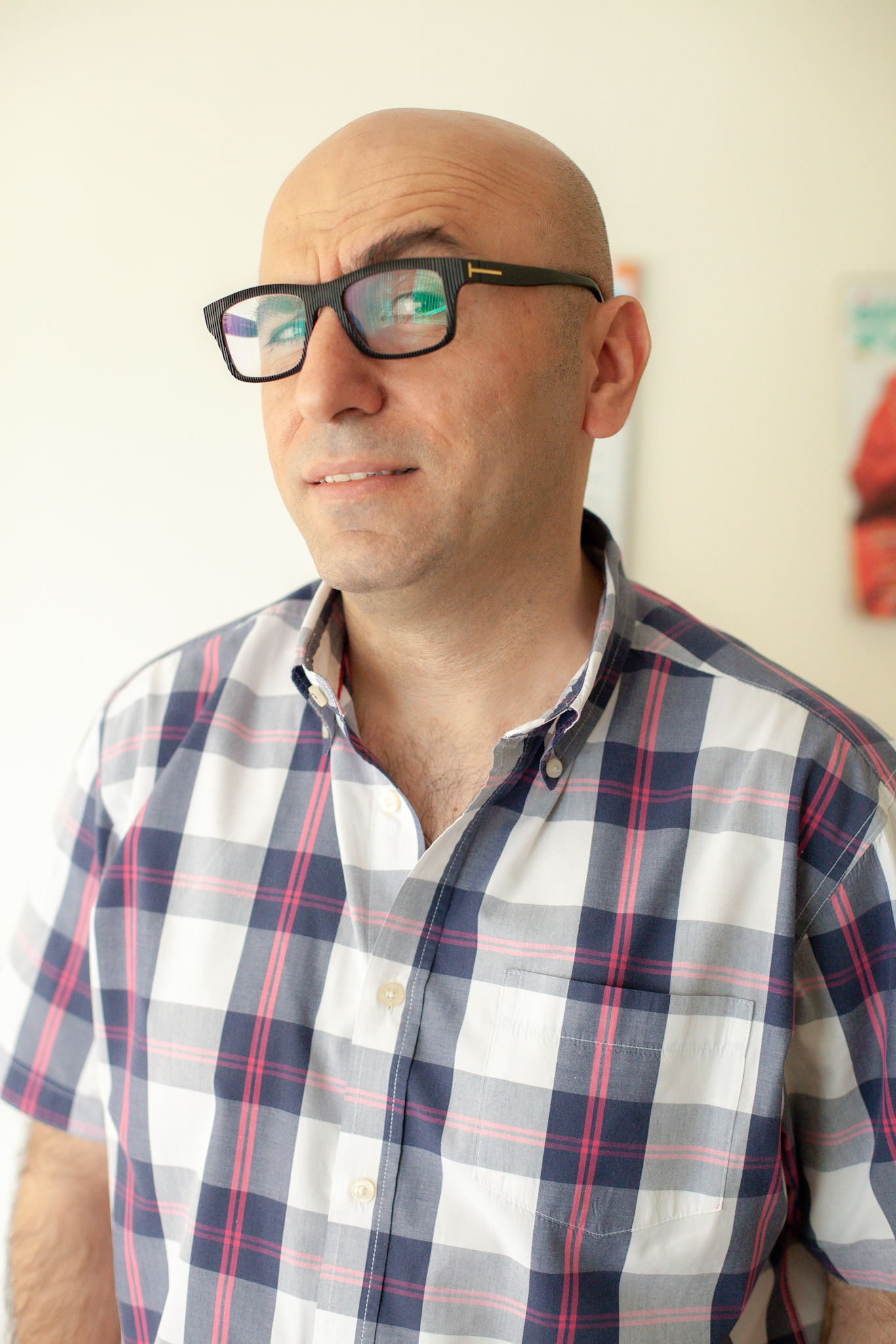 این عکس توسط پوریا افخمی در تهران ثبت شده است